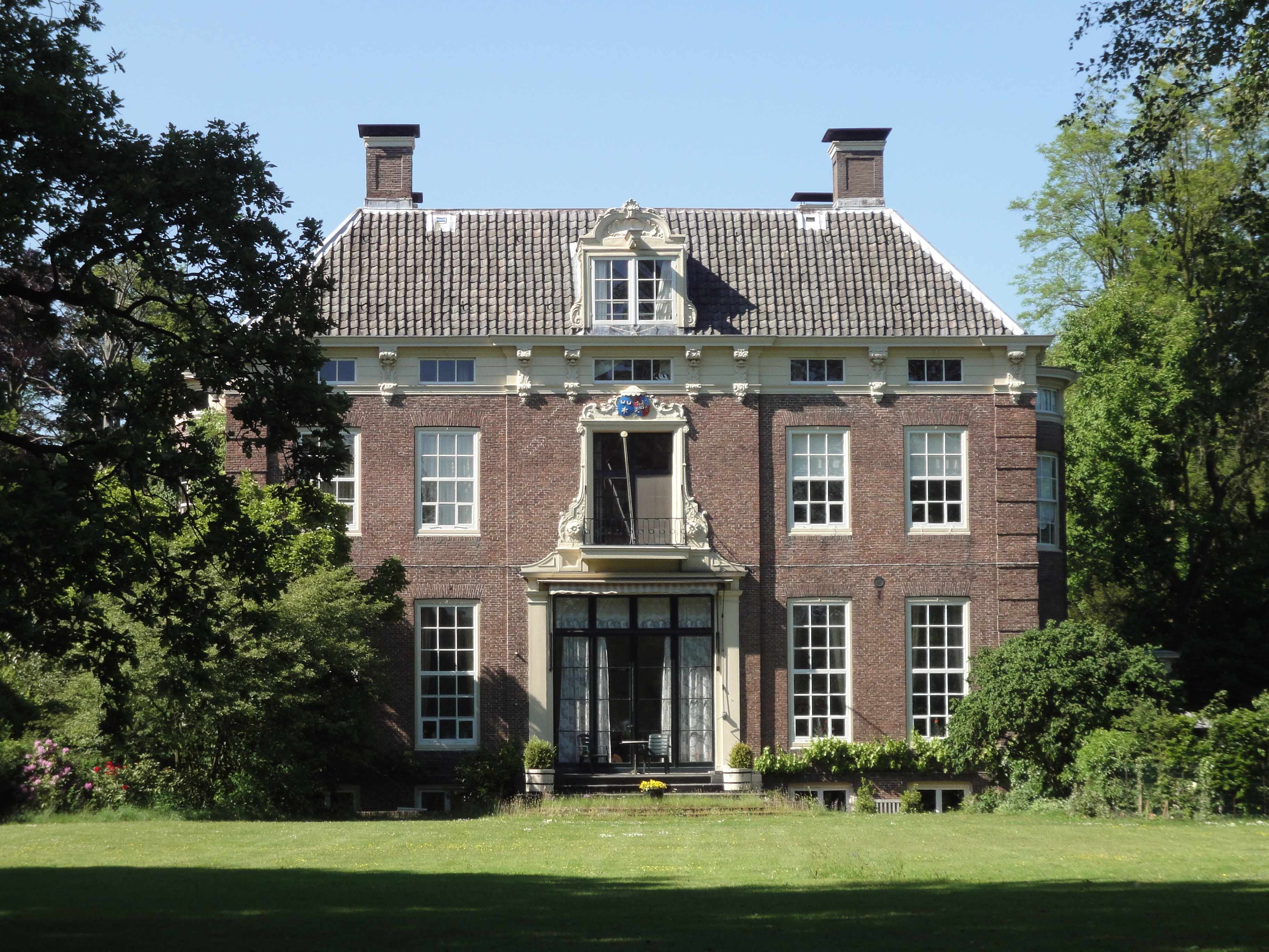 Leeuwenlaan 7, 's Graveland (gemeente Wijdemeren).